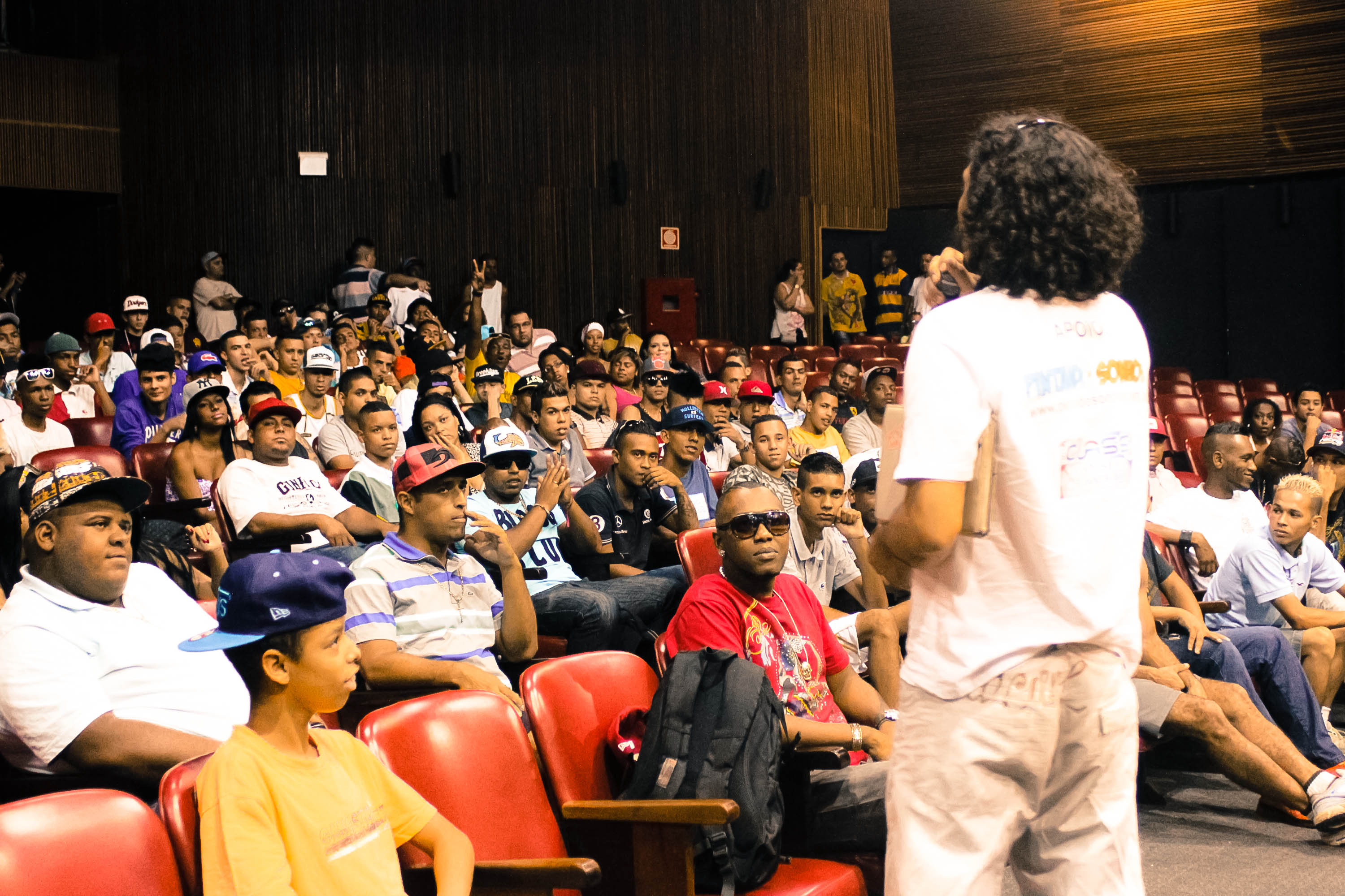 Reunião da liga do funk @ Galeria Olido - SP (CC by SA) Fora Do Eixo